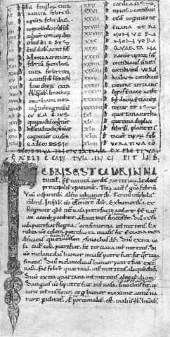 Garioponto, Liber Passionarii. Zurigo, Zentralbibliothek - Ms. C 128, f. 73